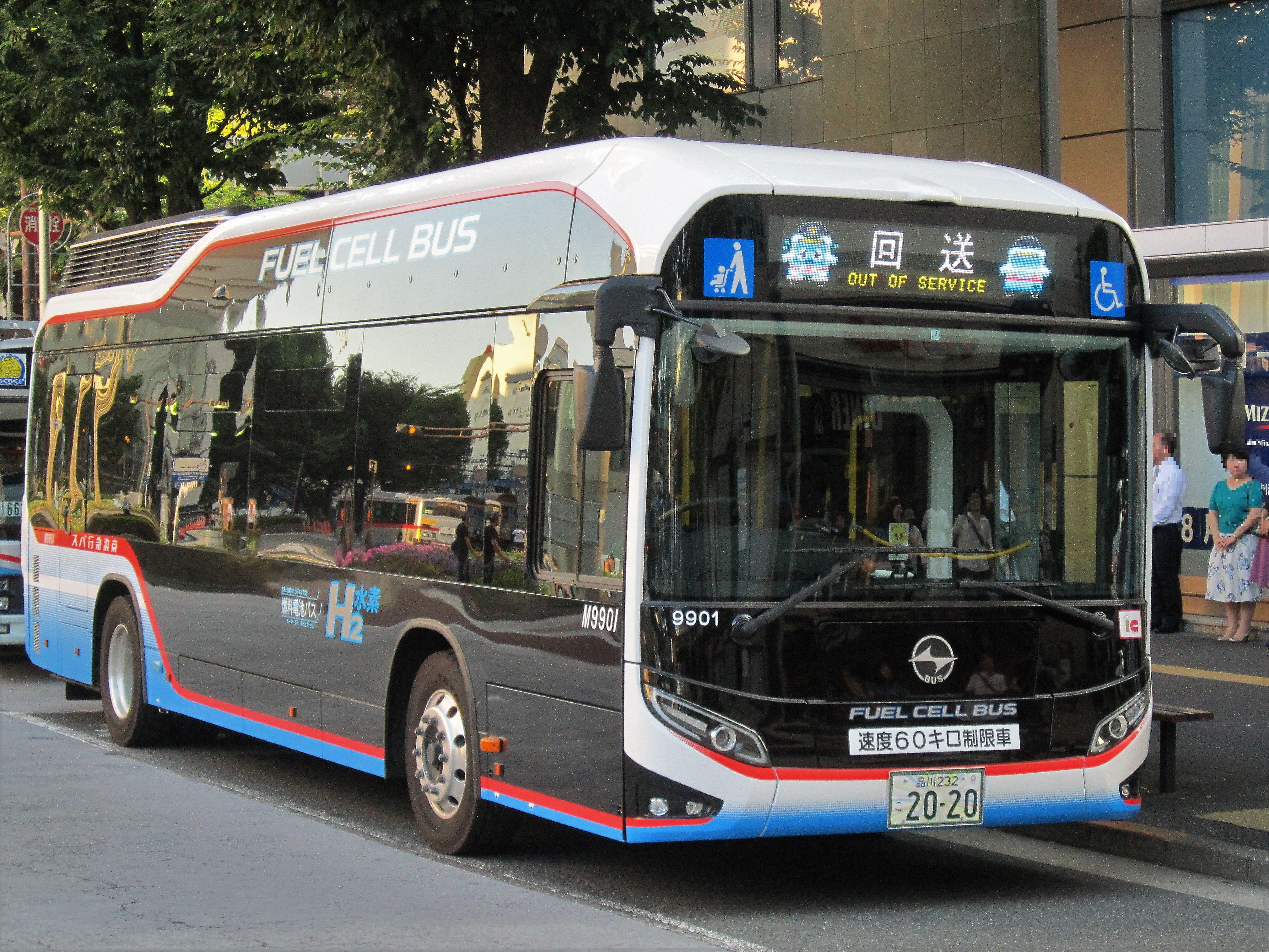 大井町駅前に停車中の京浜急行バス・燃料電池バスSORA